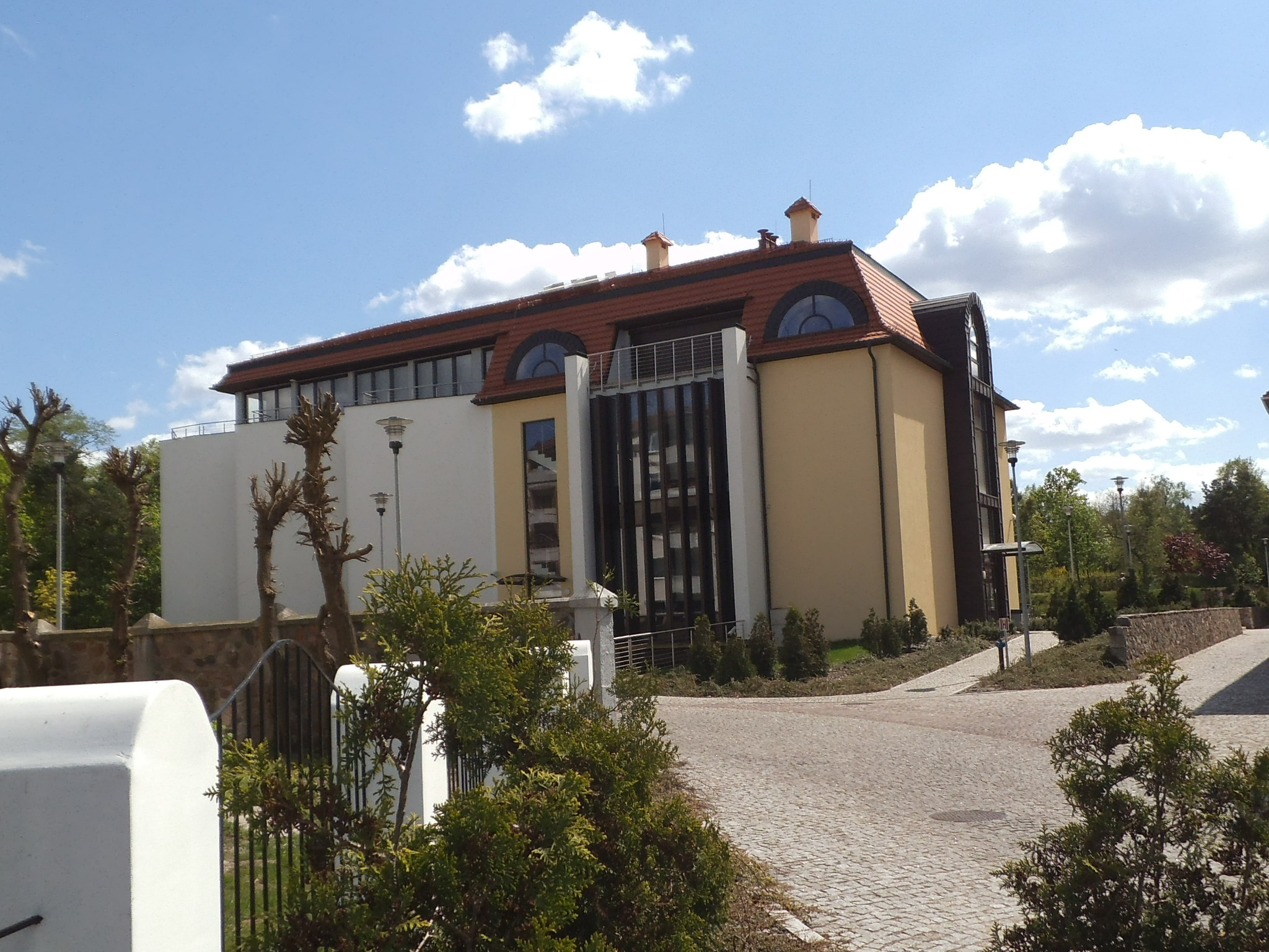 Centrum Dialogu im. Jana Pawła II w Toruniu